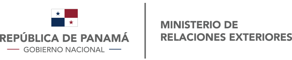 Logo del Ministerio de Relaciones Exteriores de Panamá.